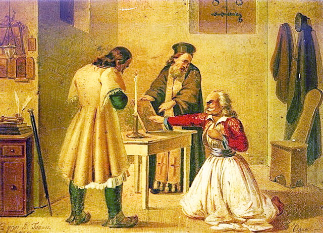 Orkos / Serment / Oath (to enter / à l'entrée dans la Filikí Etería)